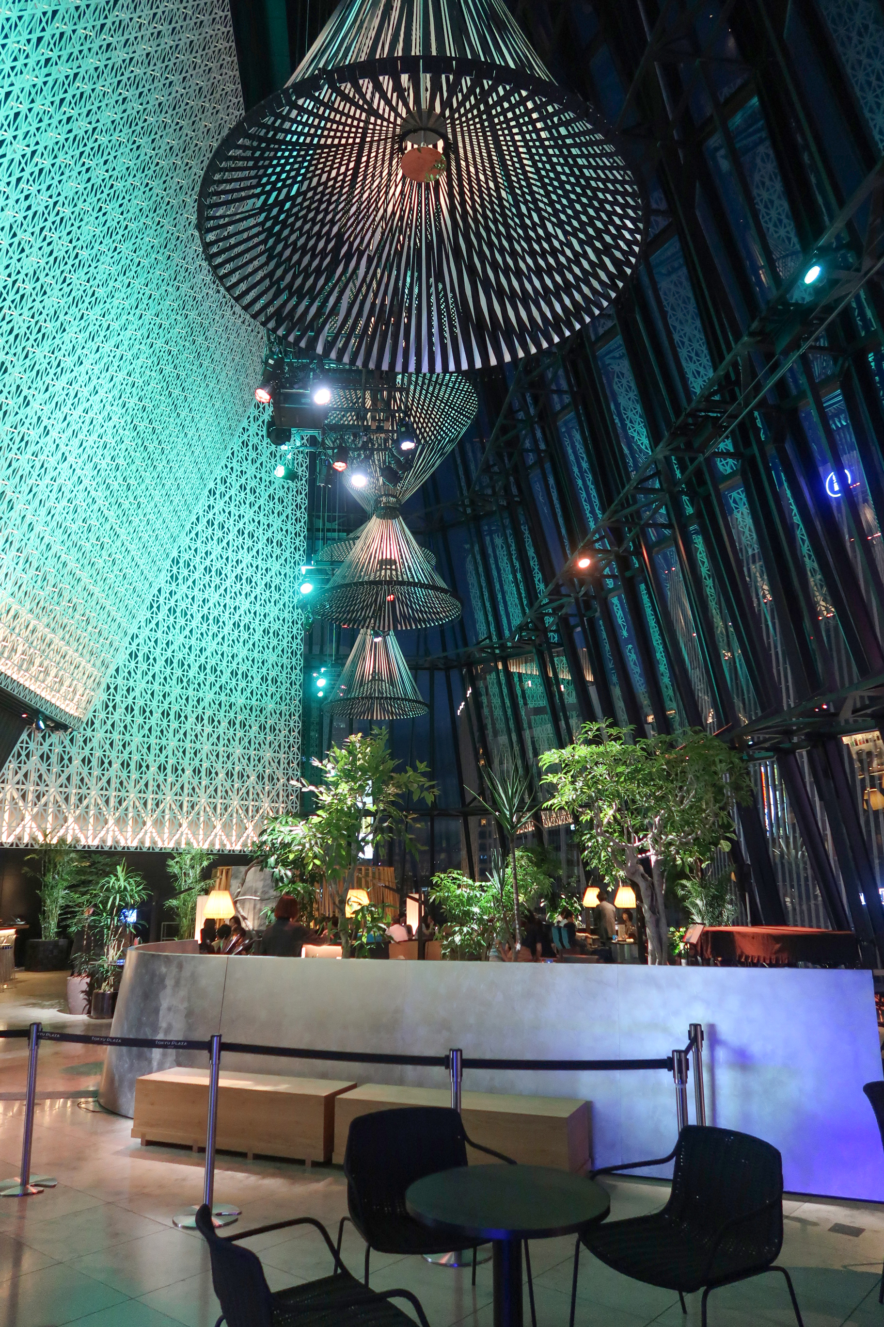 Tokyu Plaza Ginza Level 6 Kiriko Lounge night view